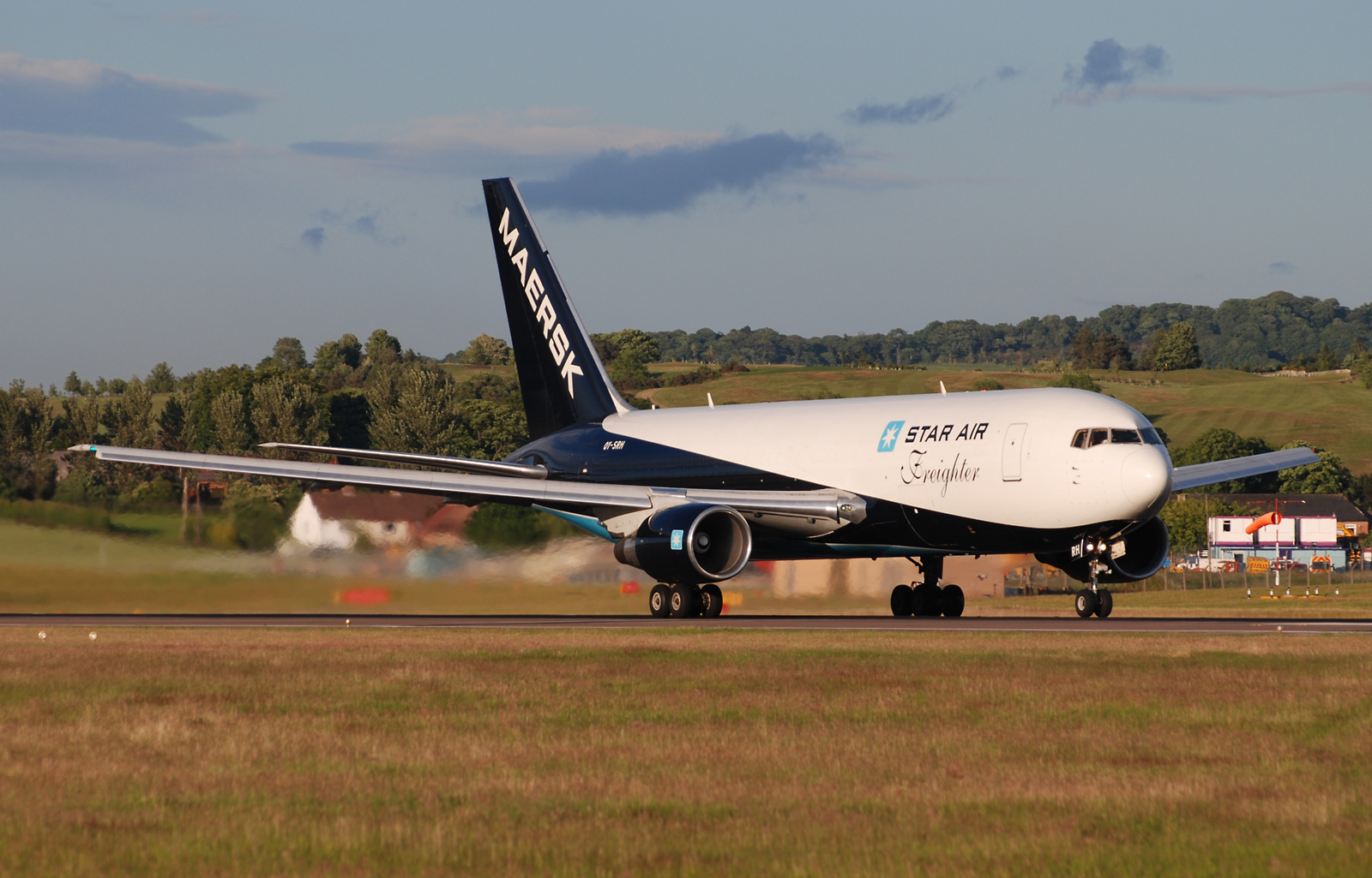 Star Air Boeing 767-204ER /F